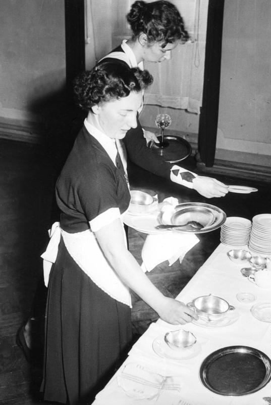 Hotelfachschule in Weinheim, Schloß Johannisburg